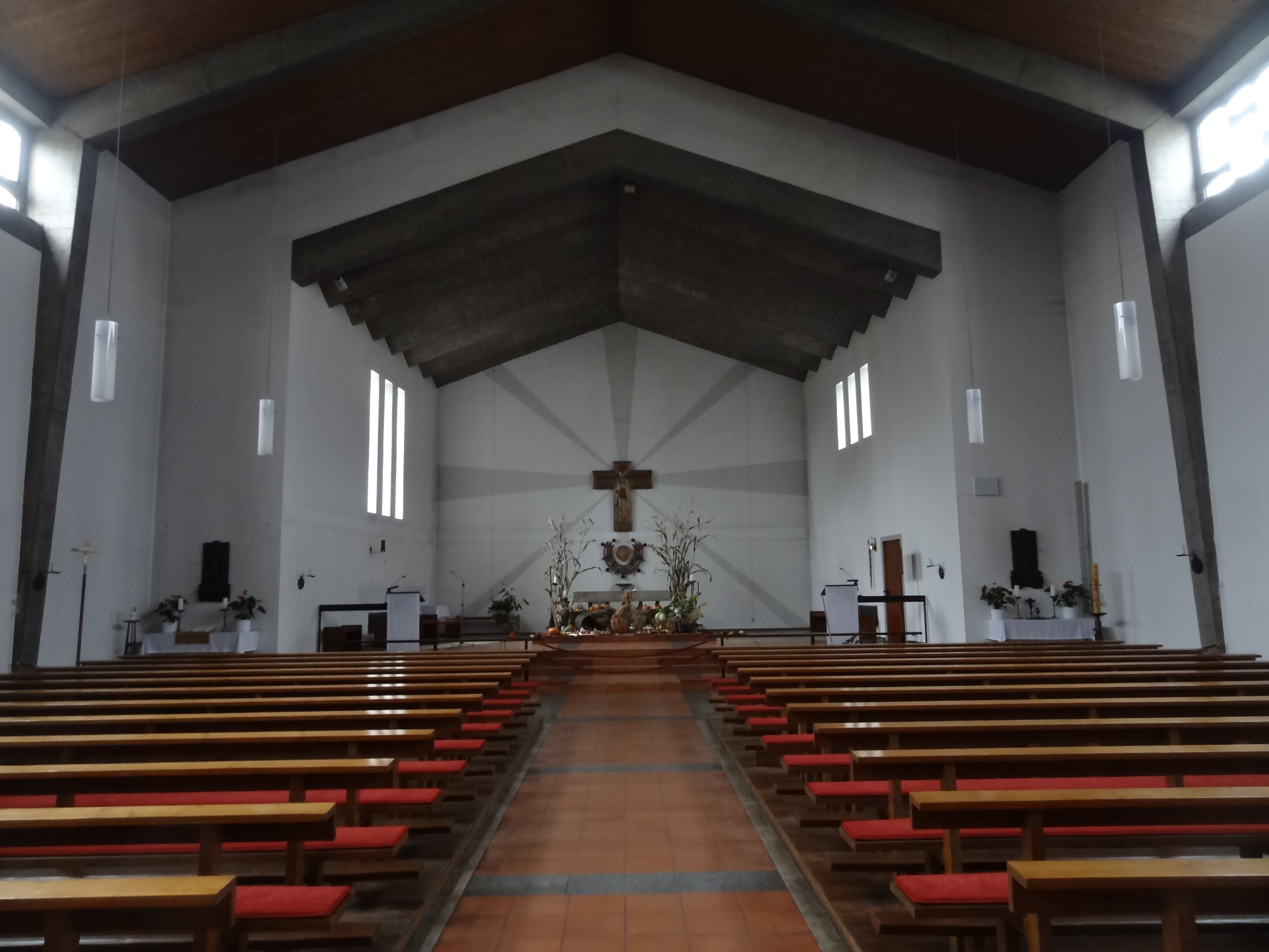 Katholische Pfarrkirche St. Erhard in Oberahrain (Gde. Essenbach, Lkr. Landshut, Bayern) - Innenansicht gegen Osten